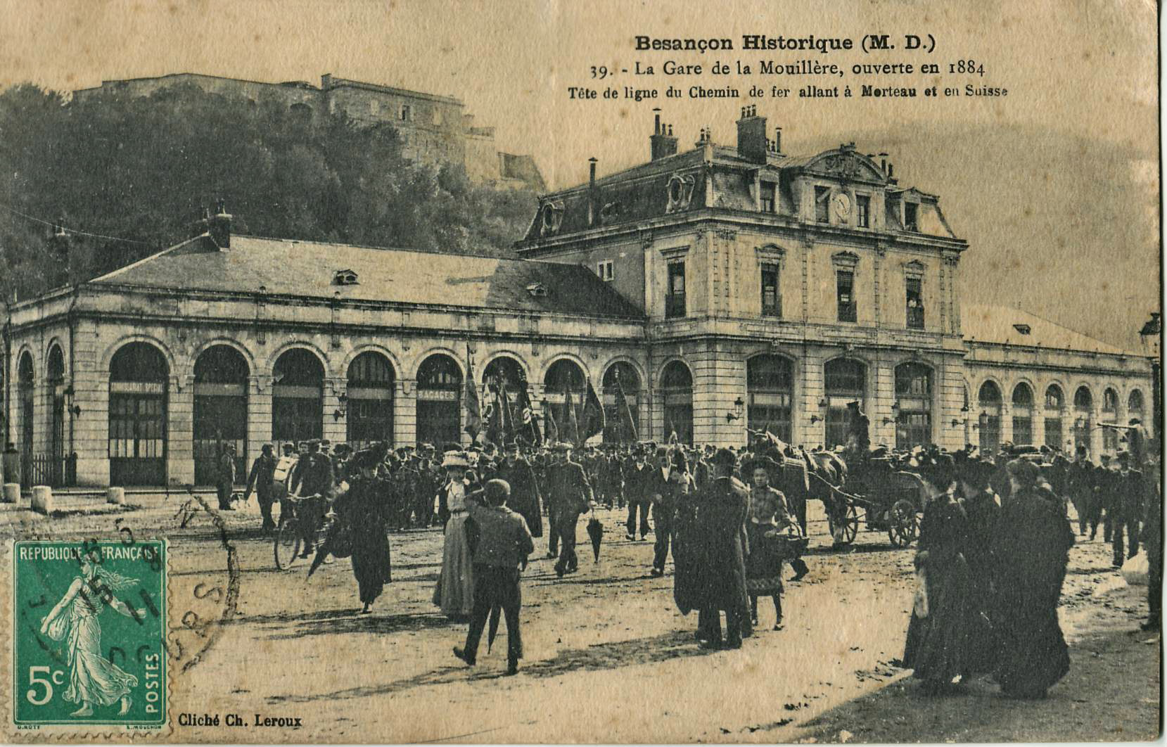 Carte postale ancienne éditée par MD n°39 (cliché Ch. Leroux) : Besançon historique - La gare de la Mouillère, ouverte en 1884. Tête du Chemin de fer allant à Morteau et en Suisse